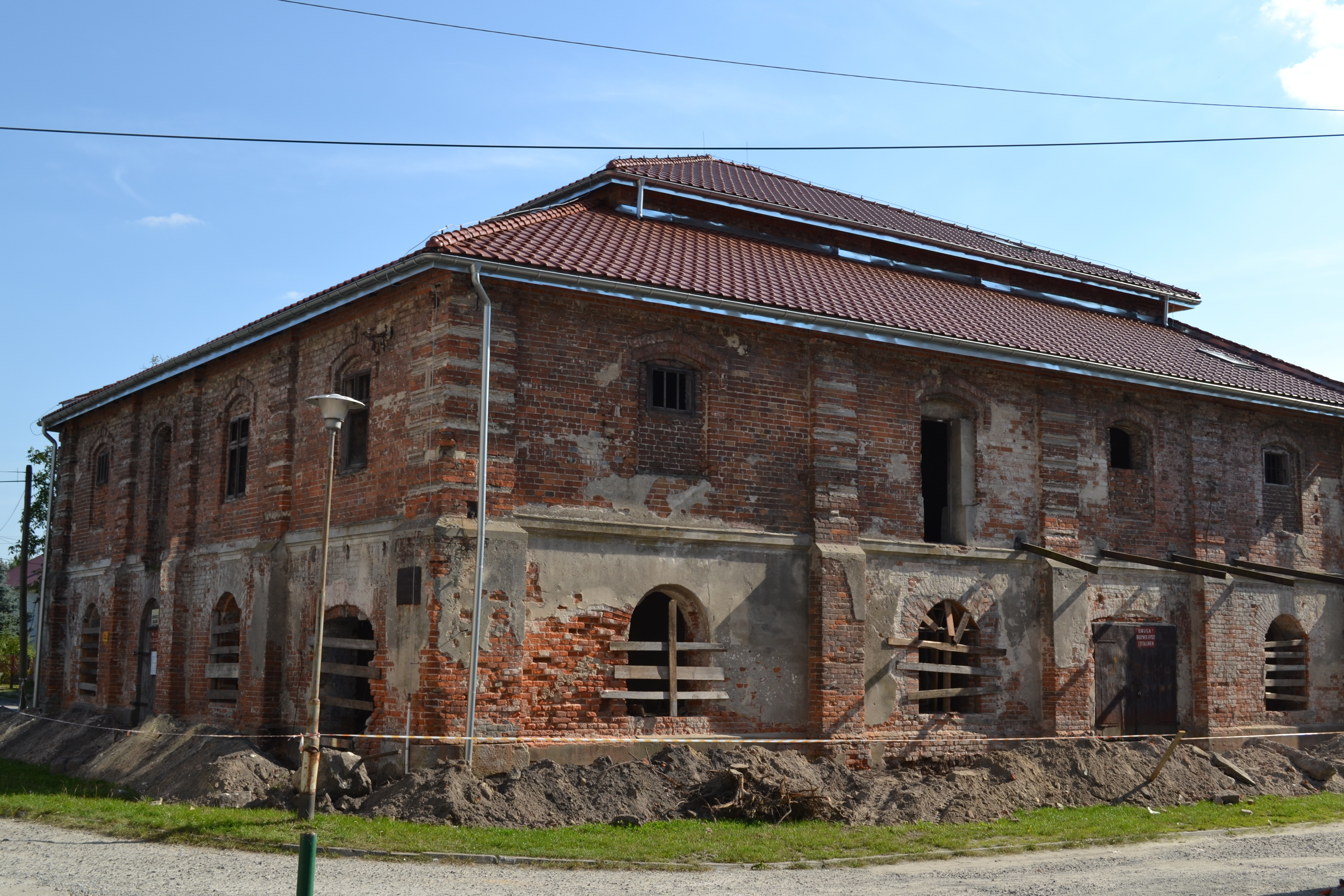 Cieszanów, synagoga, 1889